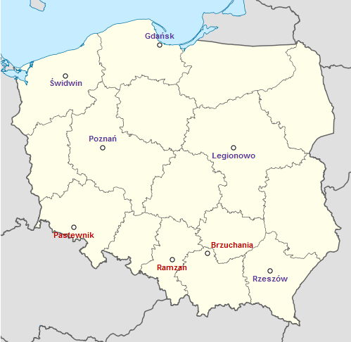 Position des différents radars du réseau polonais de radars météorologiques (POLRAD). Elle est faite à partir de la carte File:Poland location map.svg et du modèle de géolocalisation du Wiki francophone